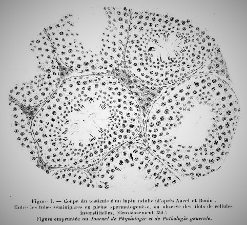 Réf. image MEDIC@ : med100000x1905xartorigx0509 Accéder au document MEDIC@ Figure 1. Coupe du testicule d'un lapin adulte (d'après Ancel et Bouin) / Figure 2. Deux cellules interstitielles du testicule humain - La Presse médicale - [Articles originaux] 20e siècle Revue : La Presse médicale - [Articles originaux], 1905, Articles originaux Edition : Masson et Cie, 1905 Cote : 100000x1905xartorig Adresse permanente de cette image